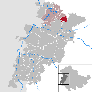 Berka v. d. Hainich in Thuringia - Wartburgkreis